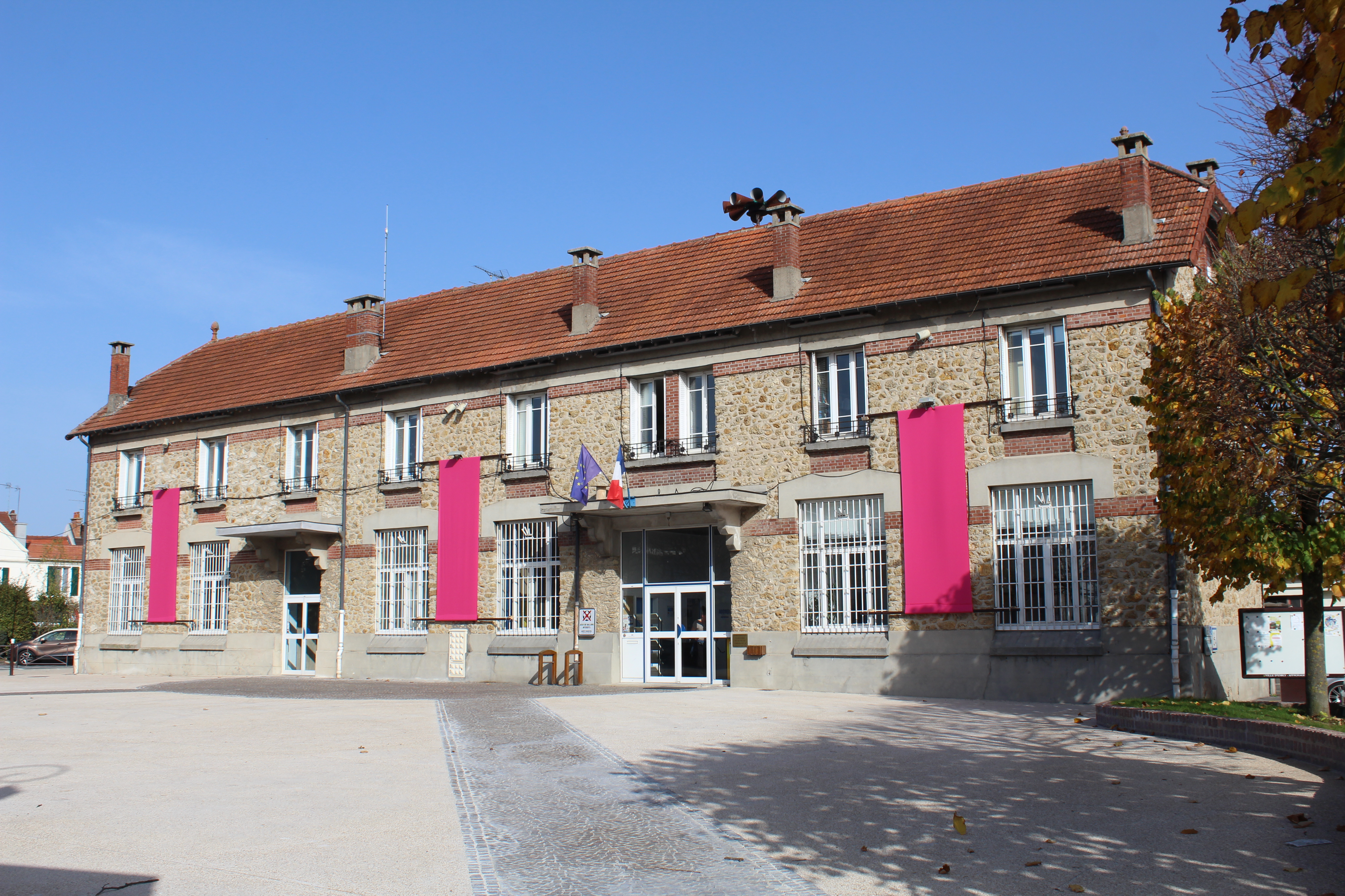 Mairie d'Esbly.